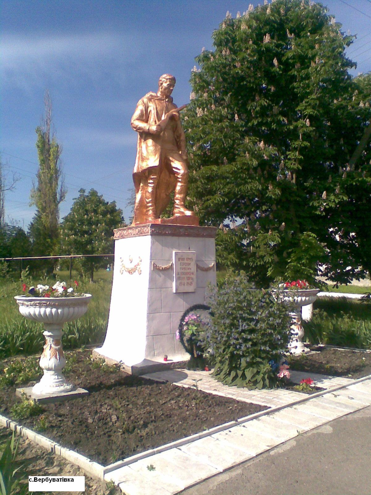 Група могил радянських воїнів у с. Вербуватівка